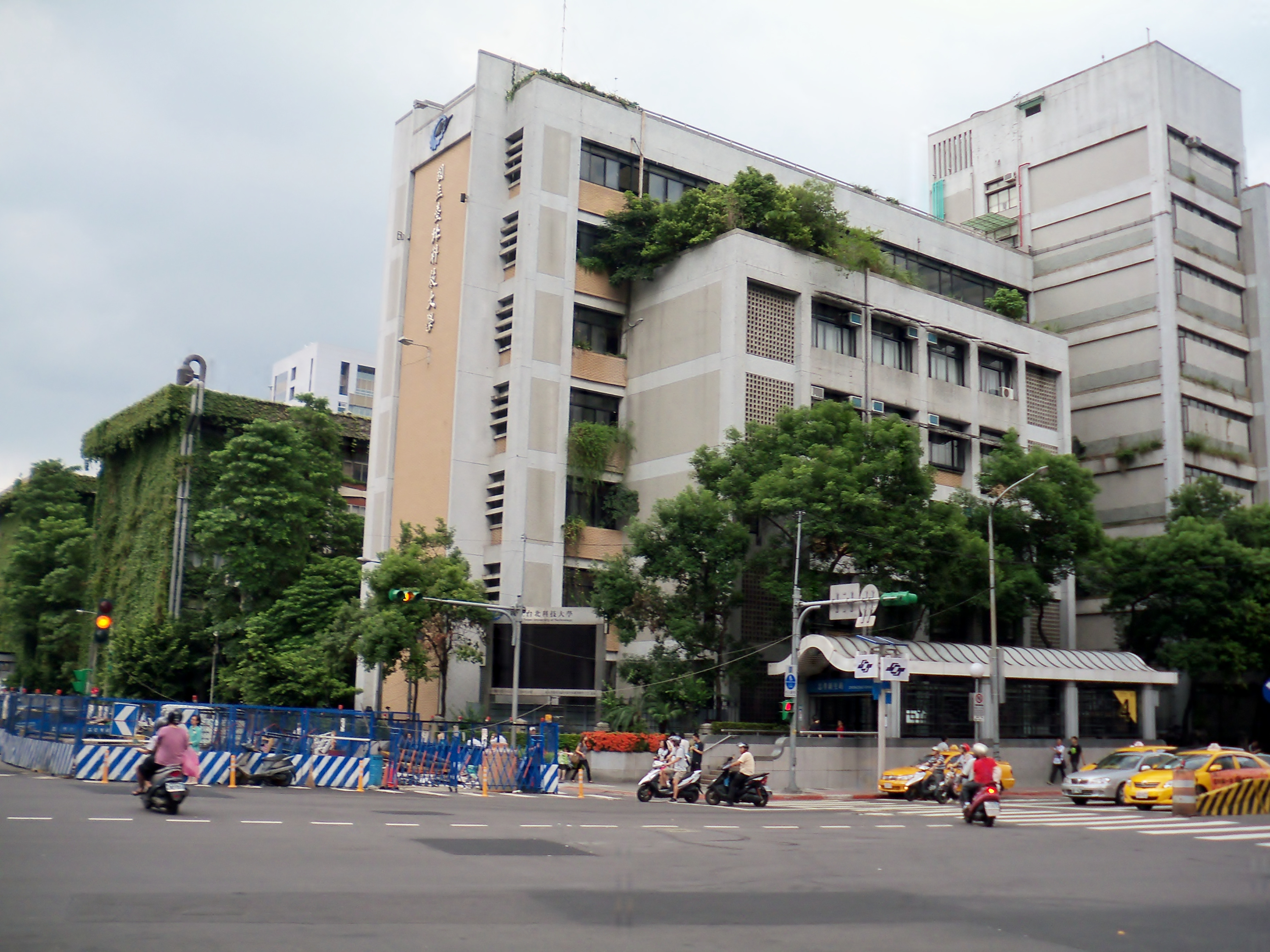 臺北科技大學設計館。